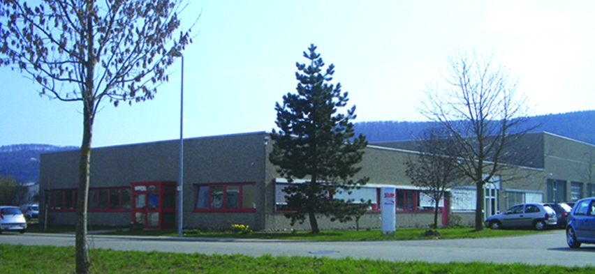 Foto Stöbich Brandschutz Niederlassung Süd Bopfingen, Deutschland